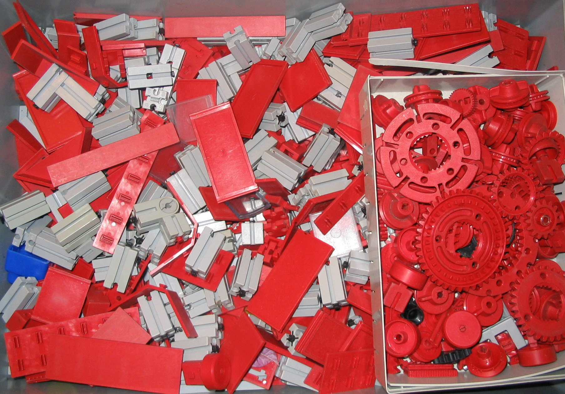 Kramkiste mit fischertechnik, selbst fotografiert.